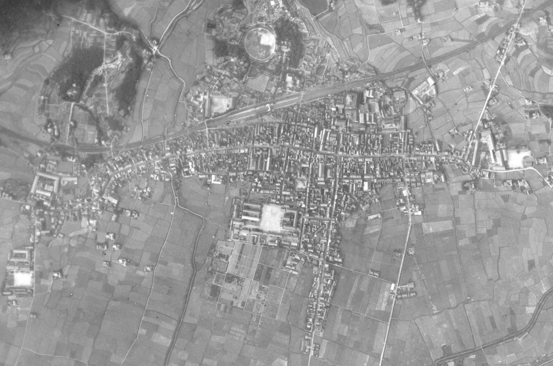 1947年広島県東広島市西条駅付近